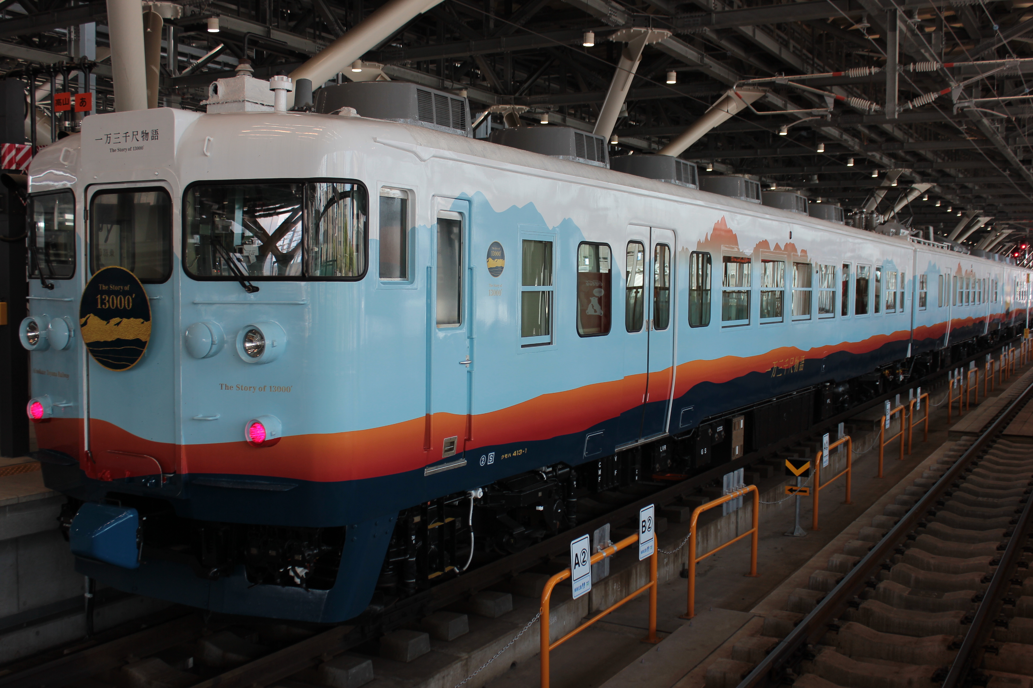 あいの風とやま鉄道の観光列車「一万三千尺物語」 Canon EOS Kiss X5